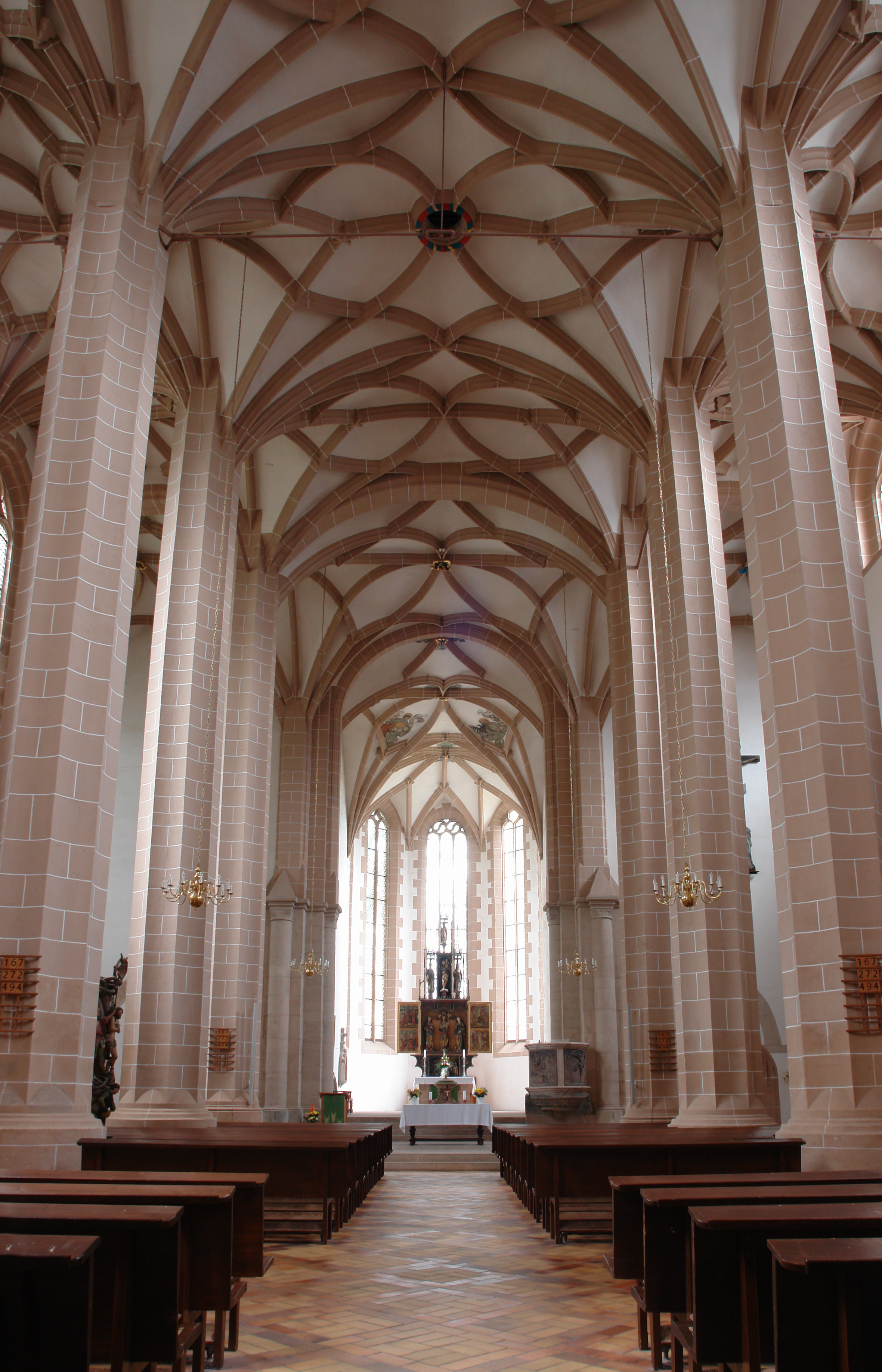 Innenraum der Schloßkirche Chemnitz